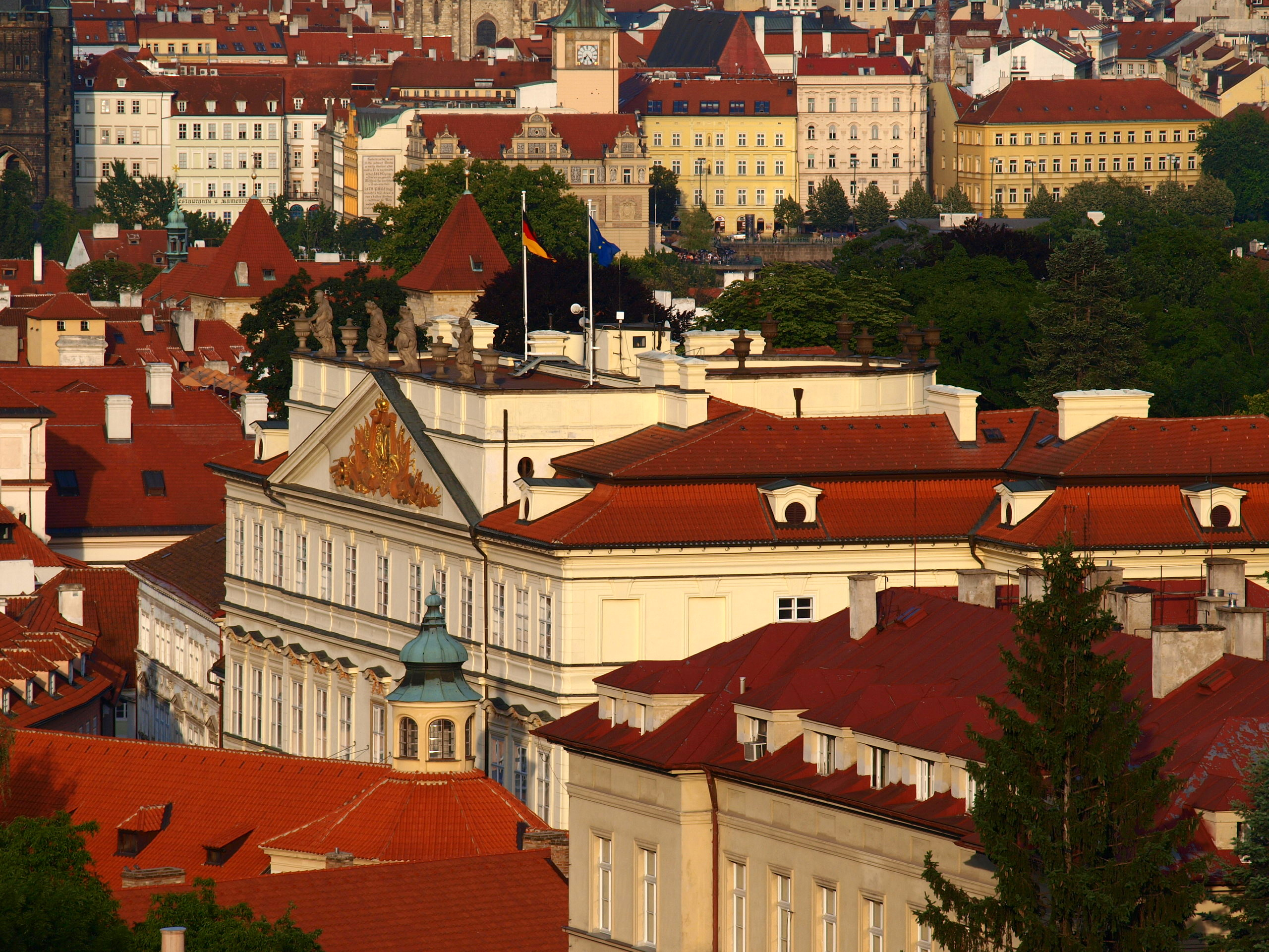 Lobkovický palác Malá Strana